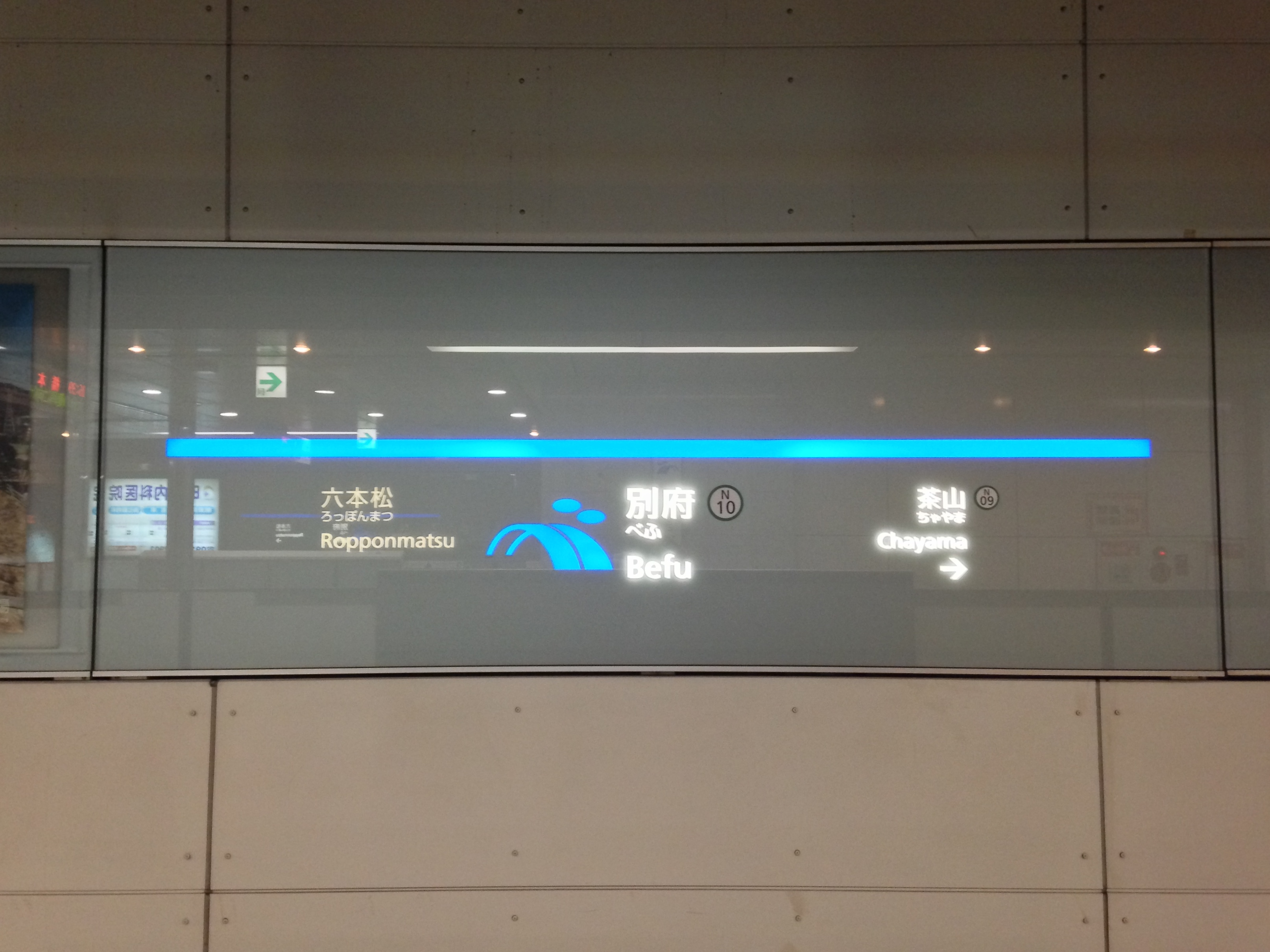 別府駅(福岡市営地下鉄)の駅名標。イラストは「別府大橋跨線橋」